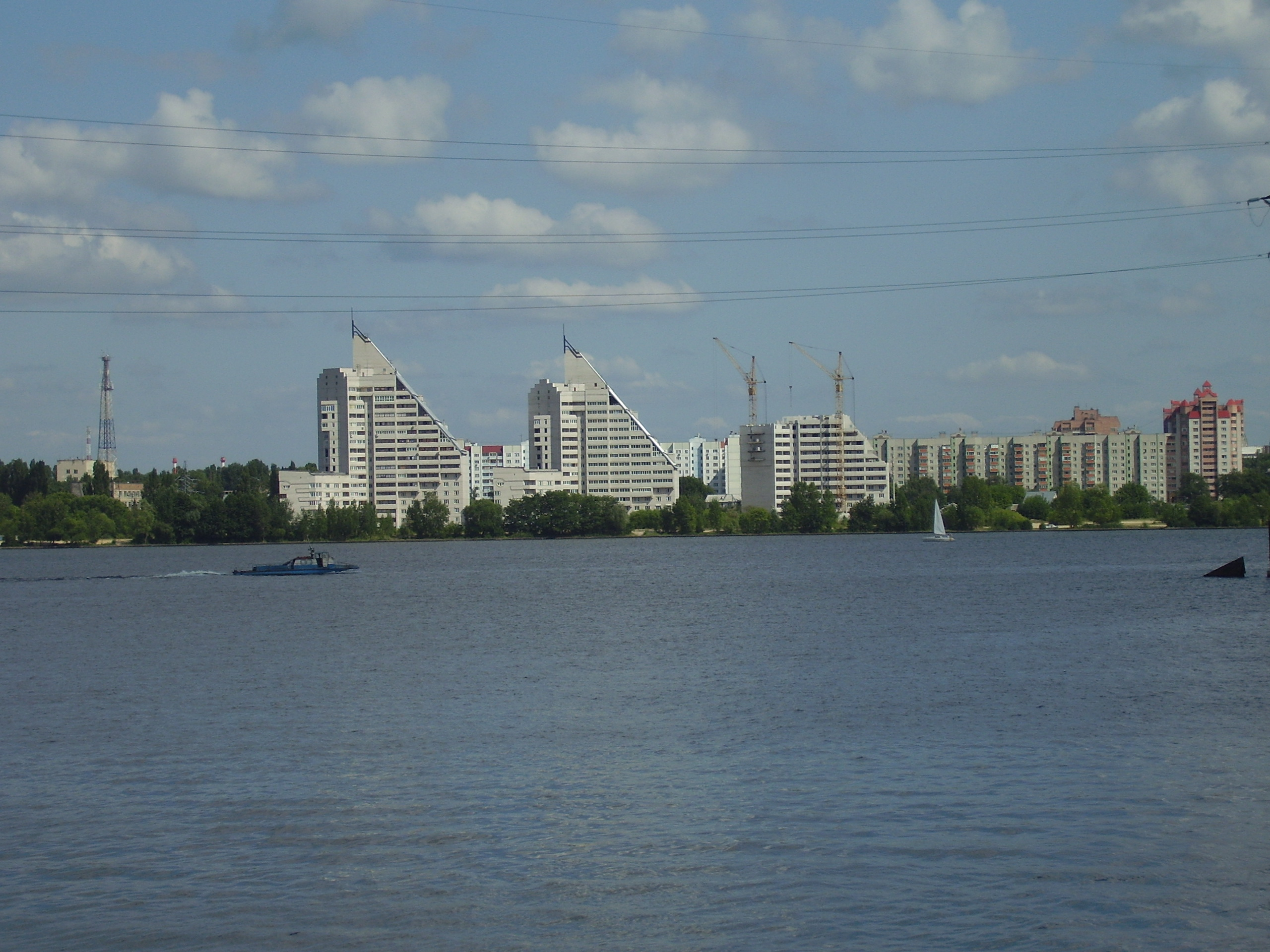 Воронеж,вид_на_Левый_берег из-за водохранилища